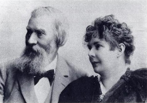 Moritz Lazarus und Nahilda Lazarus-Remy ca.1895